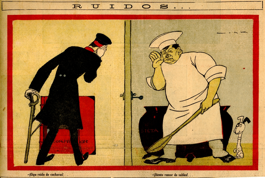 Caricatura de Arturo Alessandri